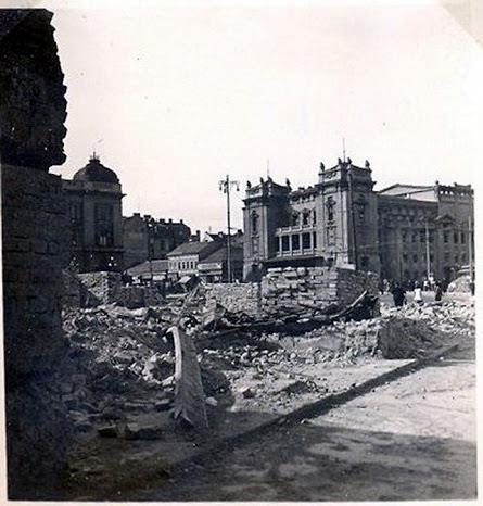 Фотографије бомбардованог Београда 06. 04. 1941. и улазак окупатора у Београд априла 1941.